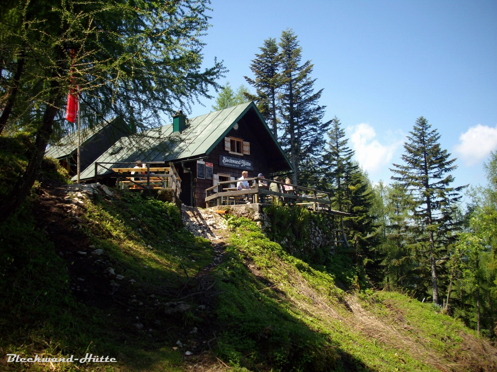 Die Bleckwand-Hütte [1]